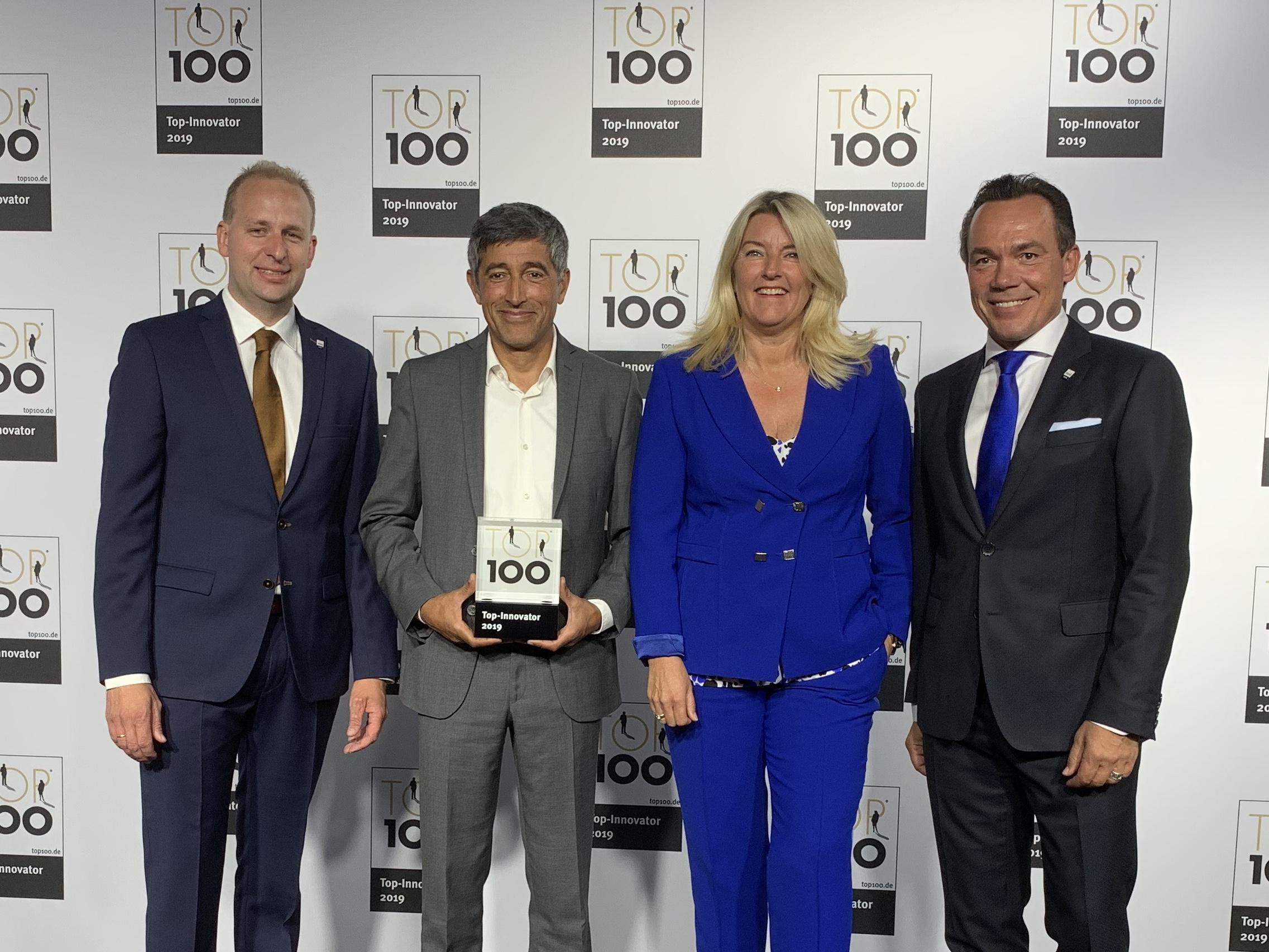 Innovator des Jahres 2019